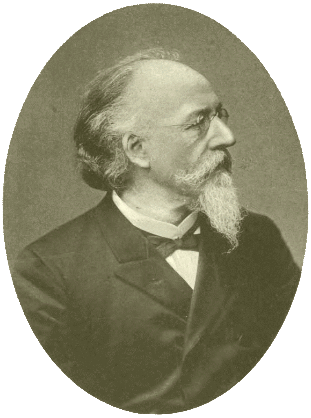 Albert Hilger (1839-1905), German pharmacist and chemist